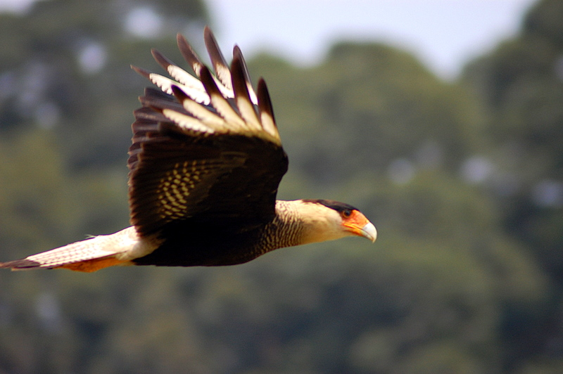 Jardim Botânico de São Paulo